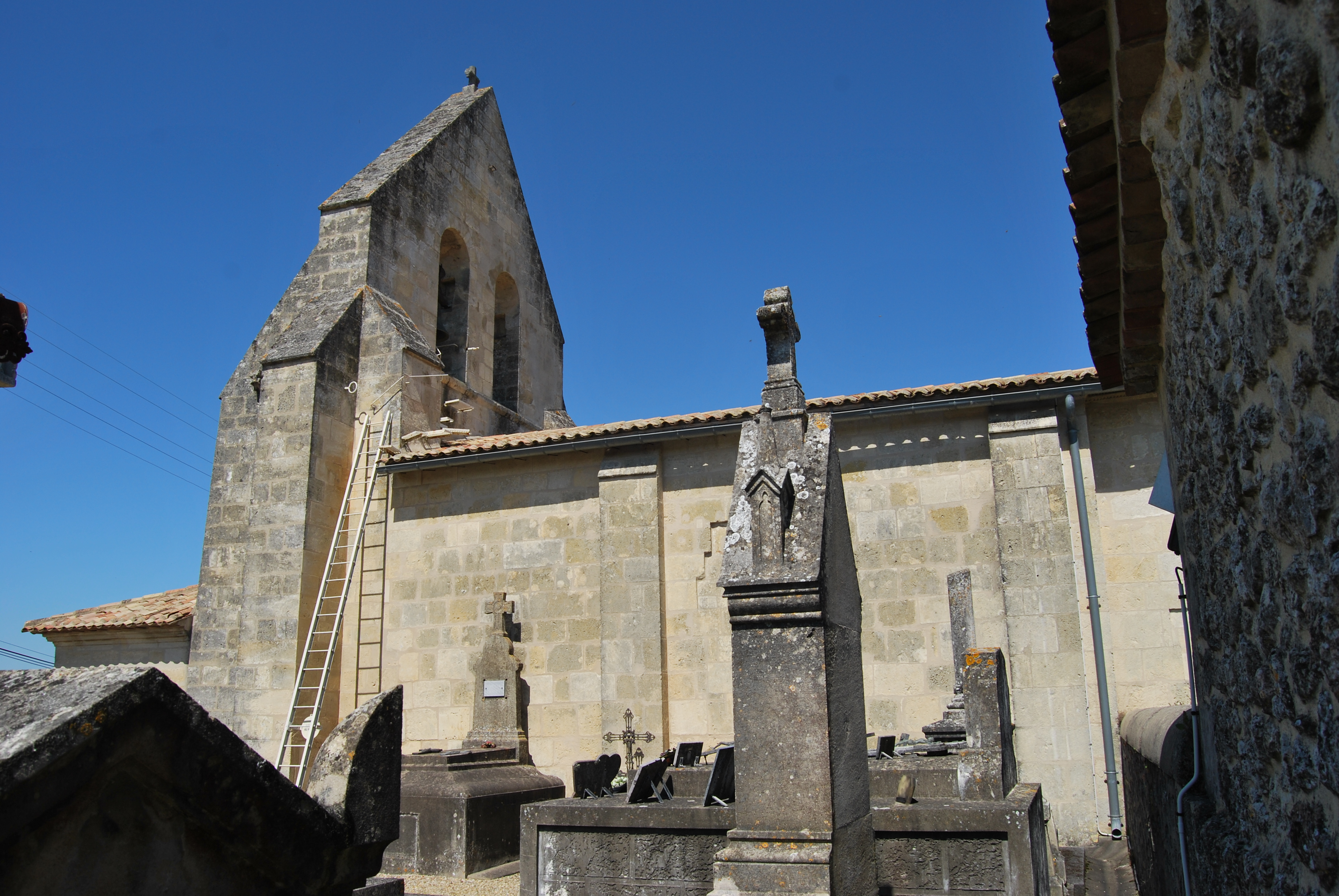 Église Saint-Seurin de Guillac (Gironde)